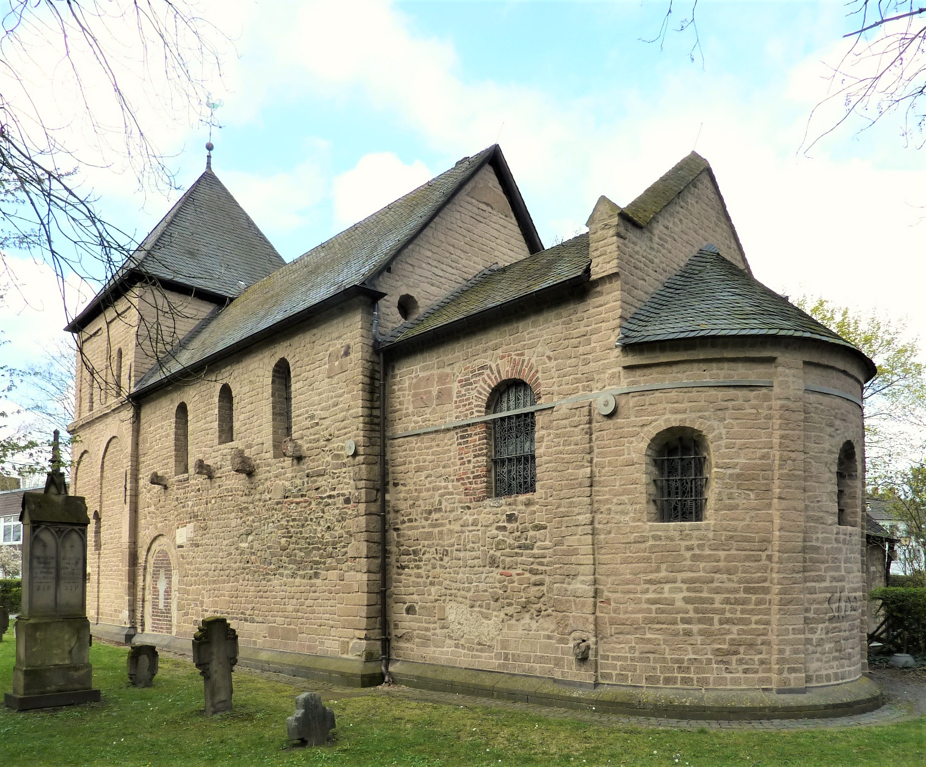 Alt Sankt Stephan (Köln-Kriel)